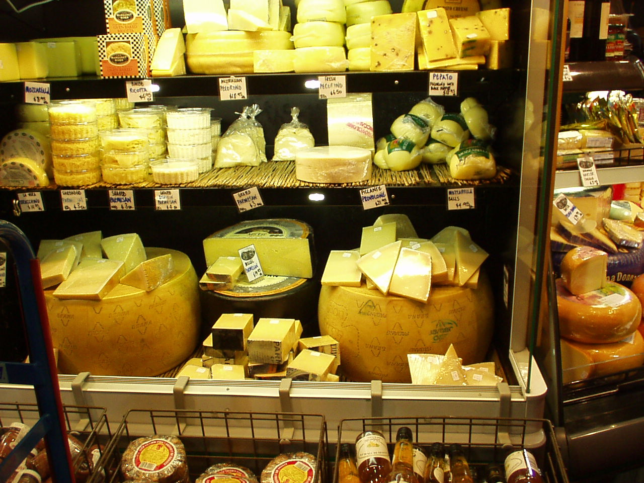 Cheese Shop Adelaide Market